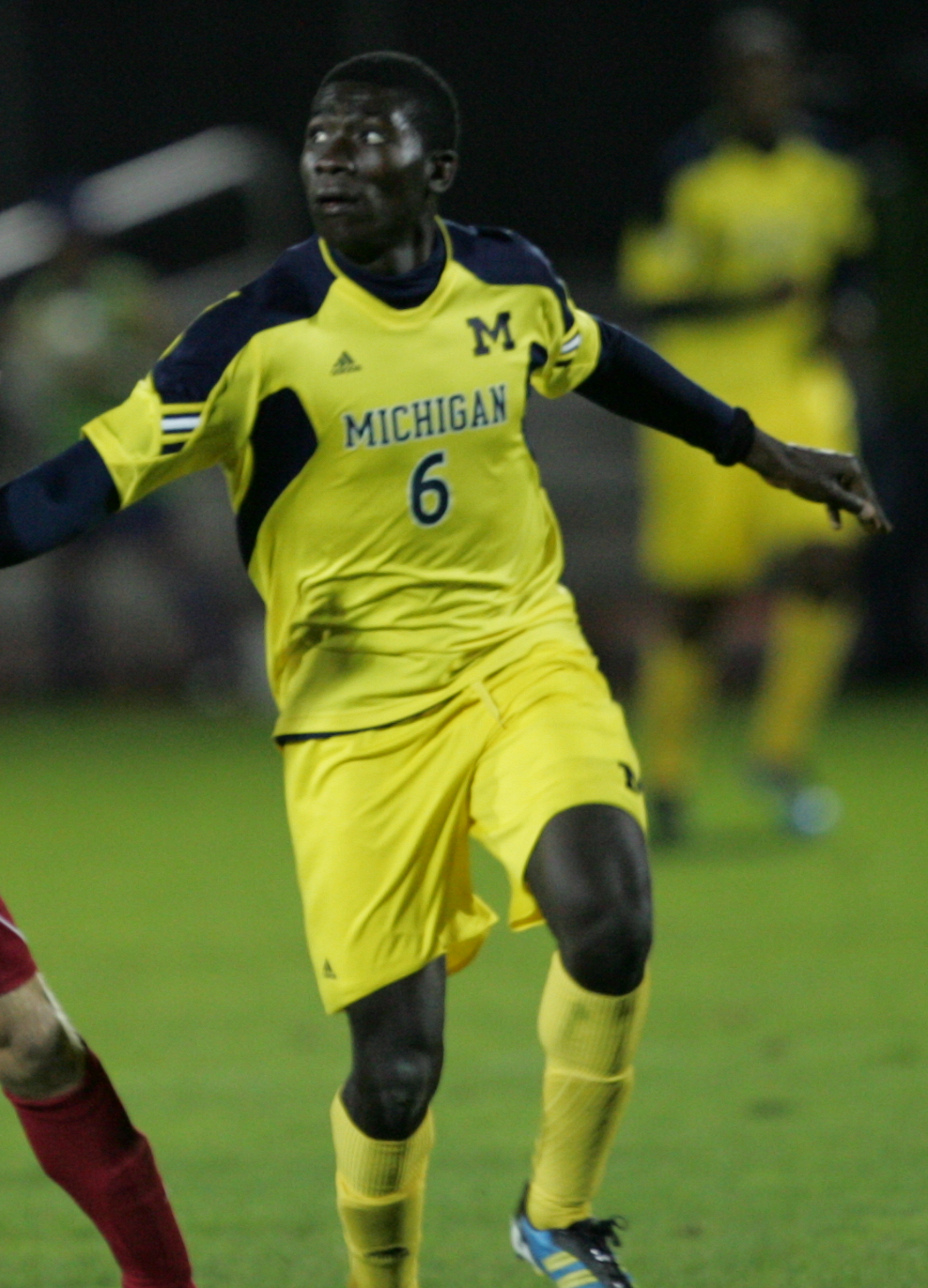 Michigan vs. Indiana